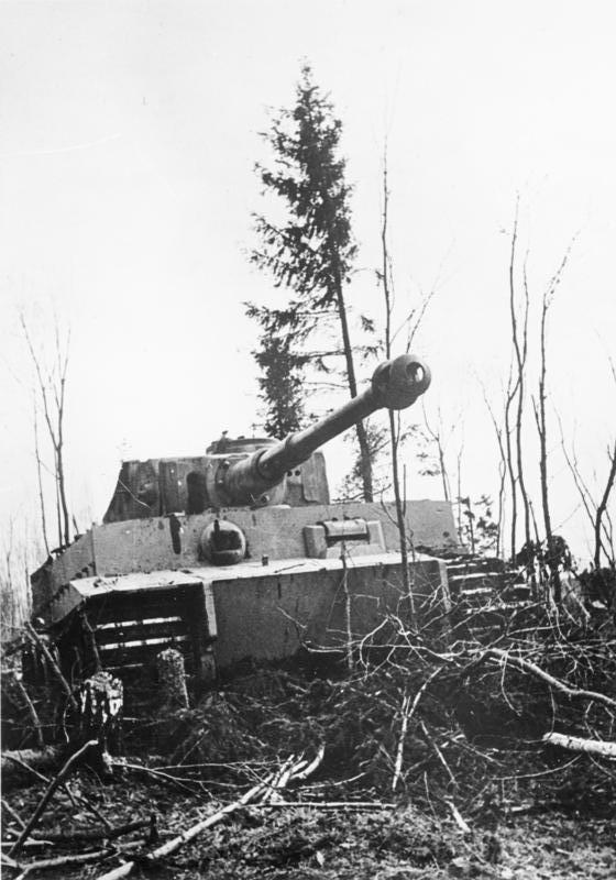 Der "Tiger" an der Ostfront vor Leningrad Information added by Wikimedia users.Schwere Panzer-Abteilung 502 (only unit ever near Leningrad)[1]